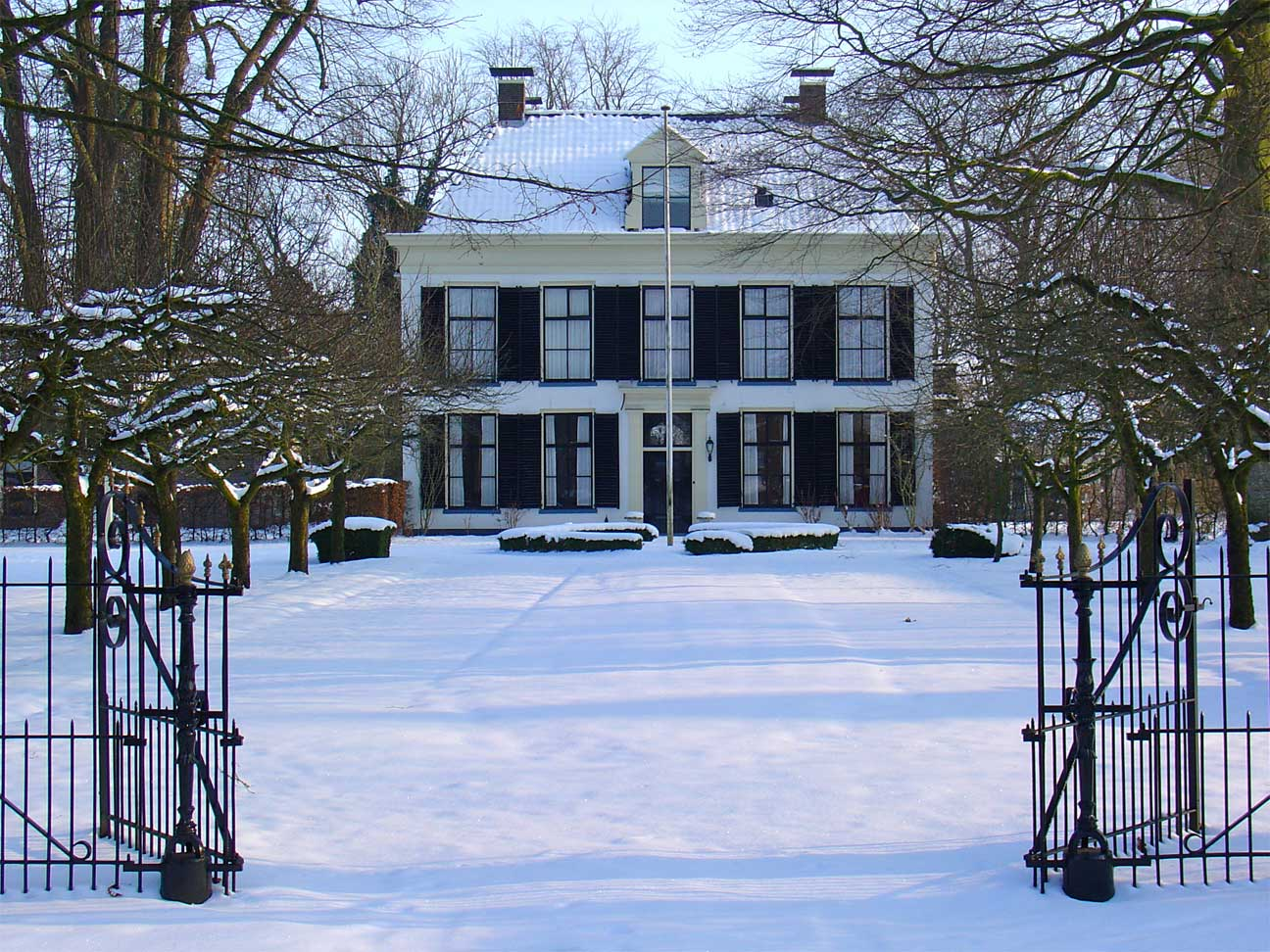 Westrup in Dwingeloo (Drenthe)